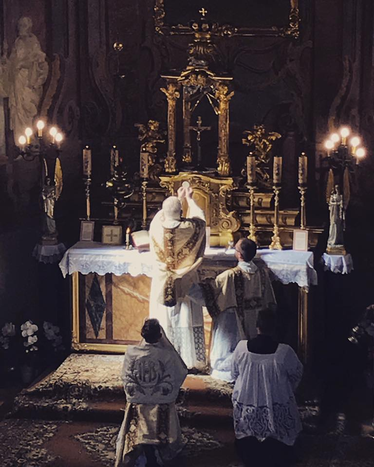 Jan Sikorski odprawia Mszę Świętą w Michałowicach w ramach pielgrzymki akademickiej dla grupy Biało-Czarno-Czerwonej, 2017.